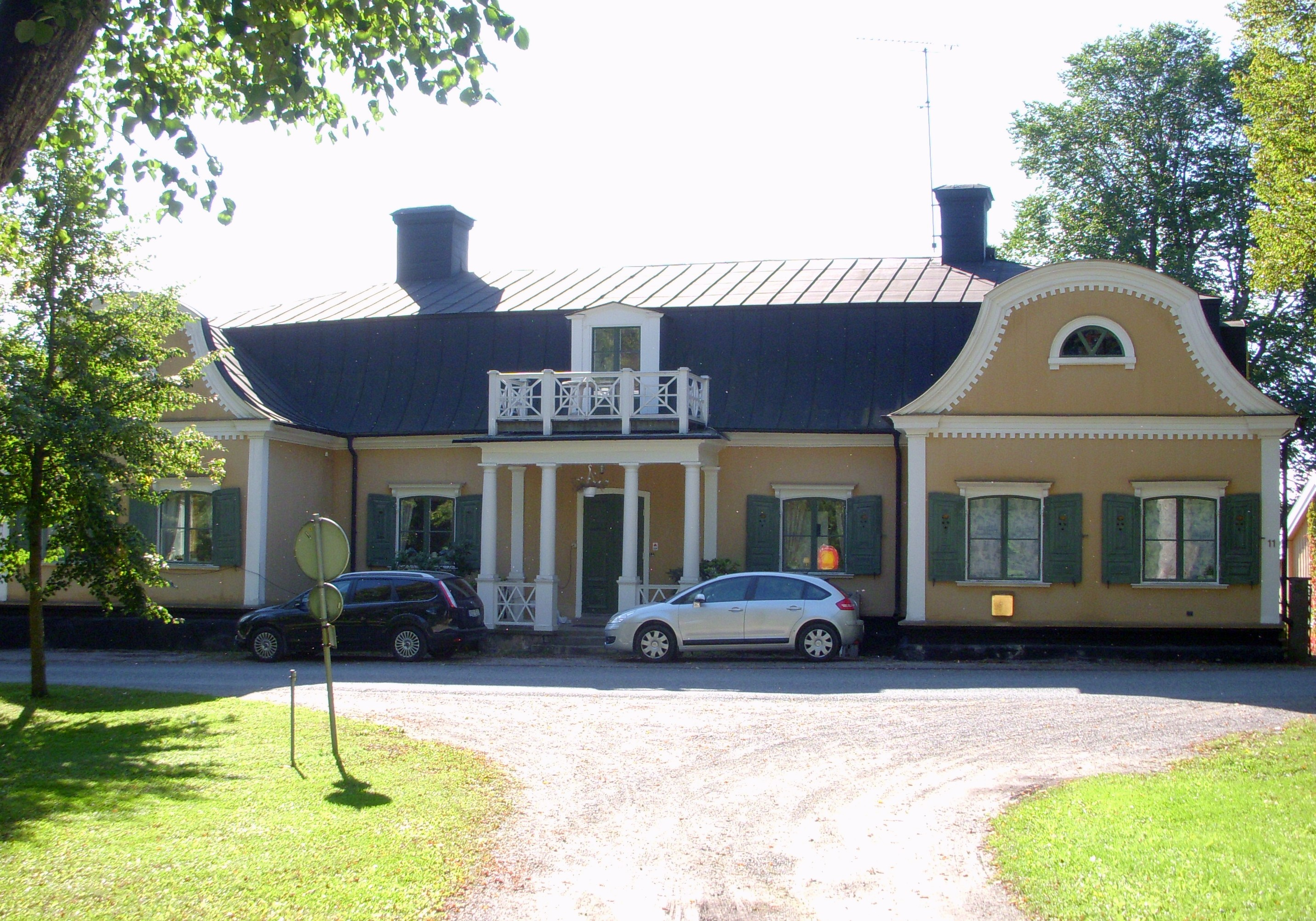 Cantongatan 11, Drottningholm